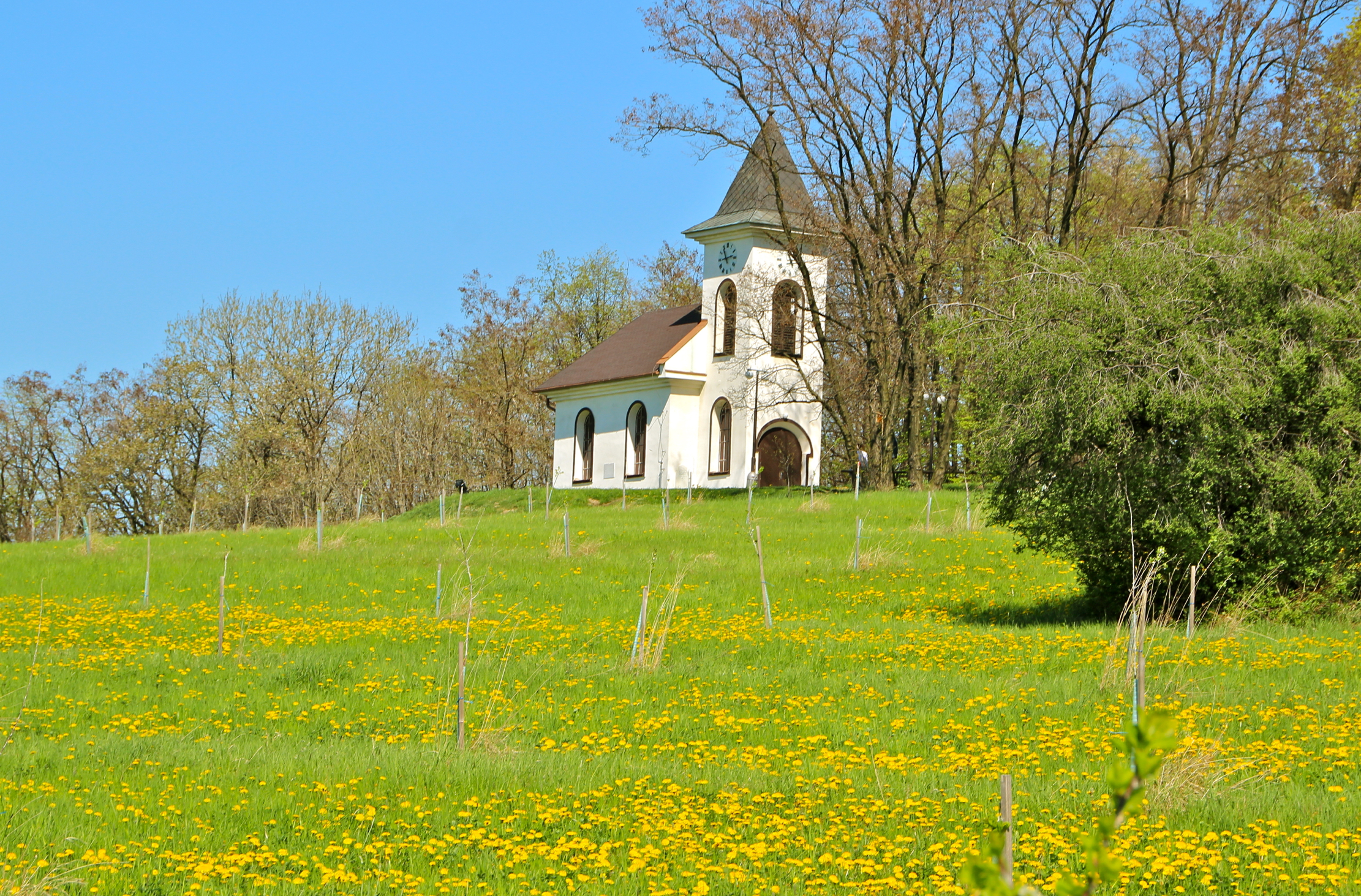 Rusín – wieś w Czechach, w powiecie Bruntál, w kraju morawsko-śląskim.